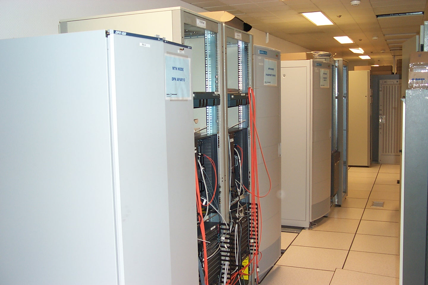 Vue de baies télécom du laboratoire client "Lab-SENIC" ("SITA Equant Network Integration Center"), à Neuilly-sur-Seine, commun à SITA et à Equant en janvier 2001 - Baies contenant des switchs Nortel DPN100 et Passport